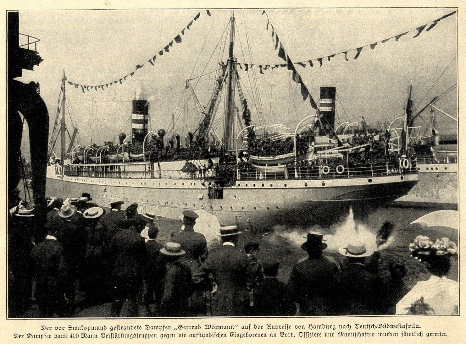 Dampfer 'Gertrud Woermann' (II) bei der Ausreise von Hamburg nach Deutsch-Südwestafrika, 1904